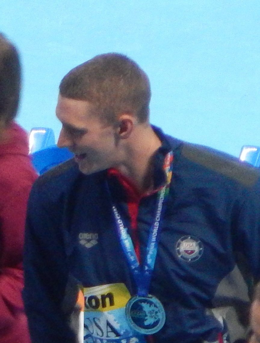 США берёт серебро в смешанной комбинированной эстафете